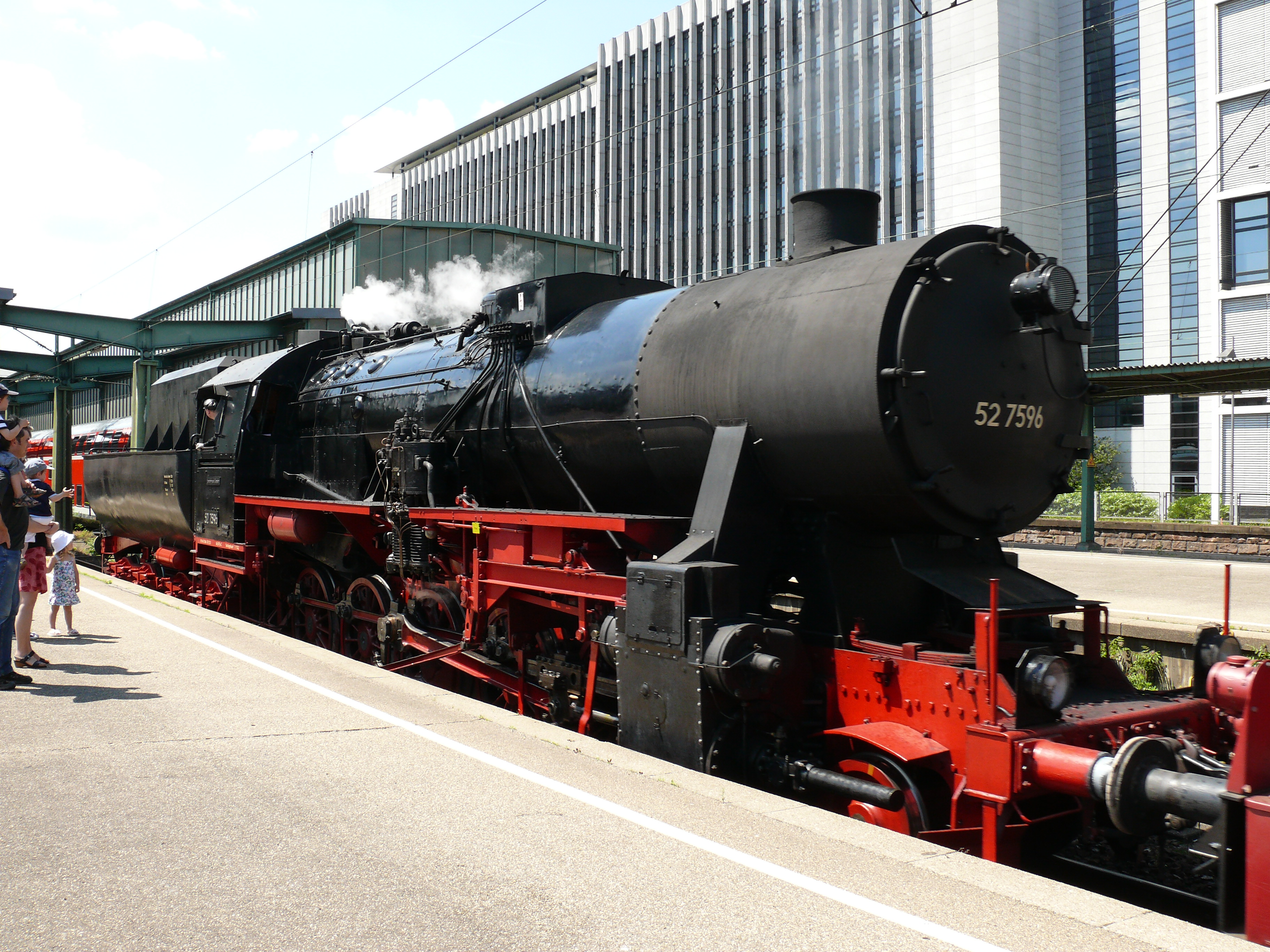 Die Dampflokomotive 52 7596 am Stuttgarter Hauptbahnhof, bei einer Sonderfahrt im Mai 2012.